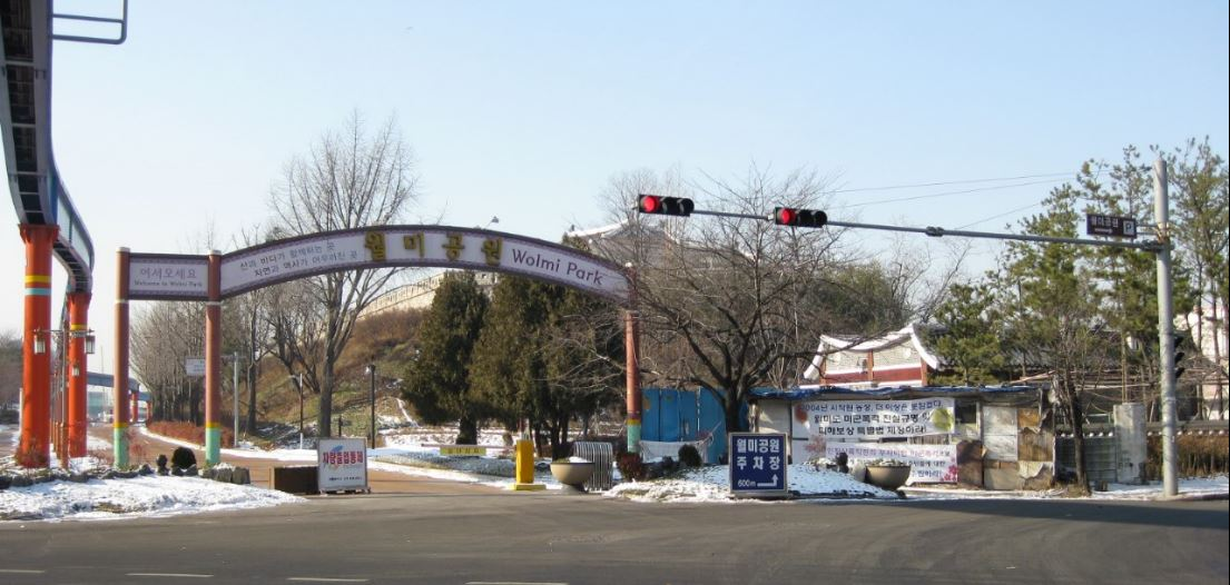 인천 중구 소재 월미공원 입구. 2004년 10월 7일 첫 농성을 시작으로 매일 회원들이 순번을 정해 농성장을 지켰다. 처음에는 열두 시간씩 교대로 밤낮없이 농성했지만, 현재는 하루 한 명이 주간에 농성을 하고 있다. 2012년 12월 26일 촬영. 촬영자 강변구.